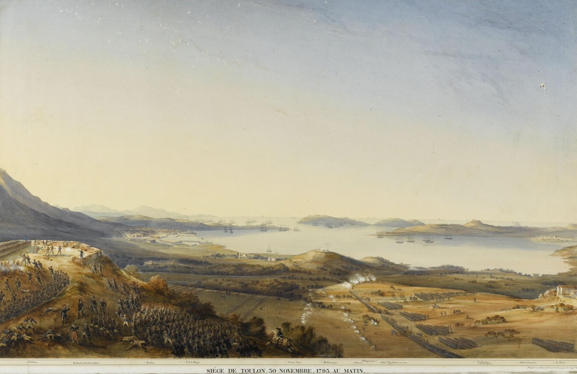 Siège de Toulon, 30 novembre 1793 au matin. Guerre de la Première coalition. Révolution française. Dimensions : 63,7 x 101,2 cm ; cadre : 79,2 x 116,6 x 6,8 cm. Matière et technique : aquarelle.